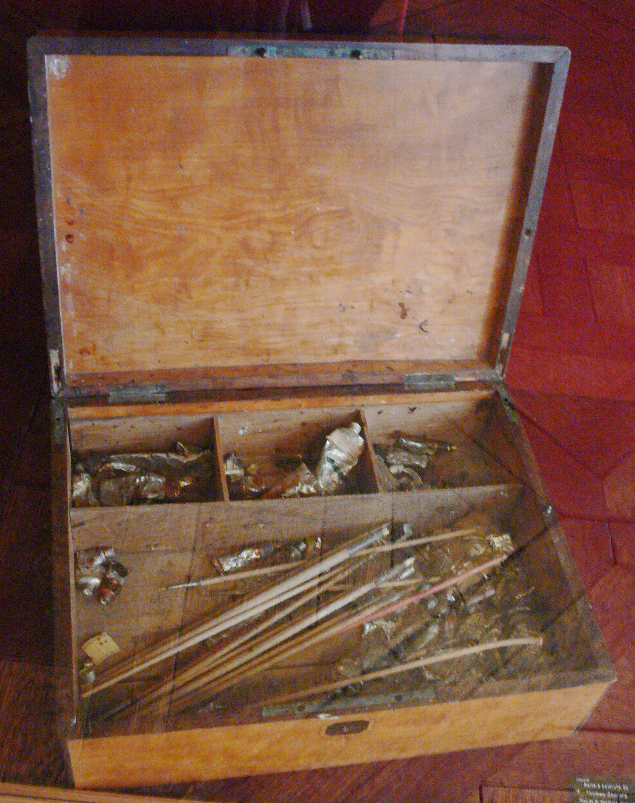 Compiègne, France: Château de Compiègne; Musée du Second Empire: Boite à peinture de Thomas Couture